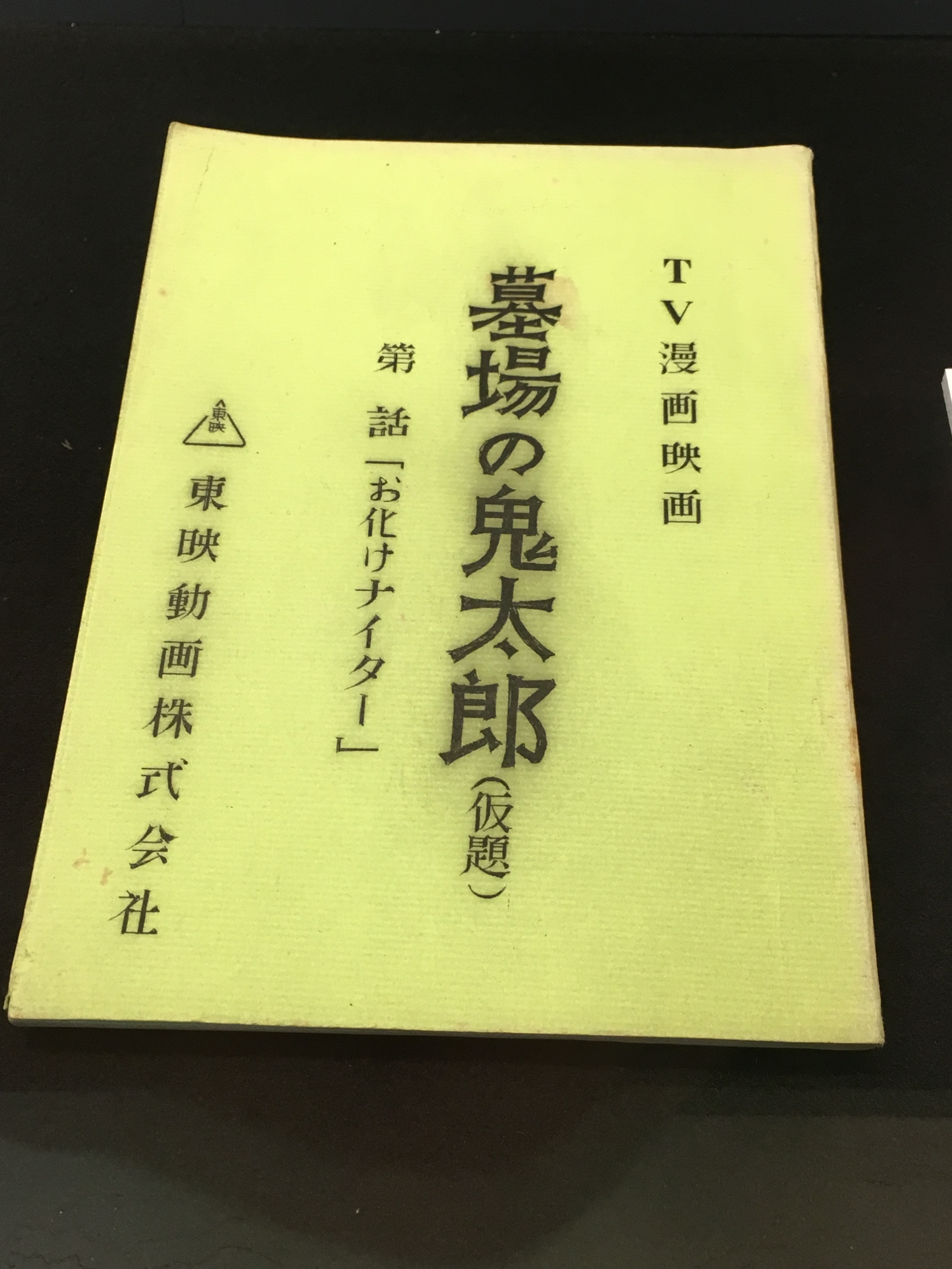 墓場の鬼太郎（ゲゲゲの鬼太郎）の台本です。 東京都調布市文化会館たづくりで展示されているもので、撮影可能です。